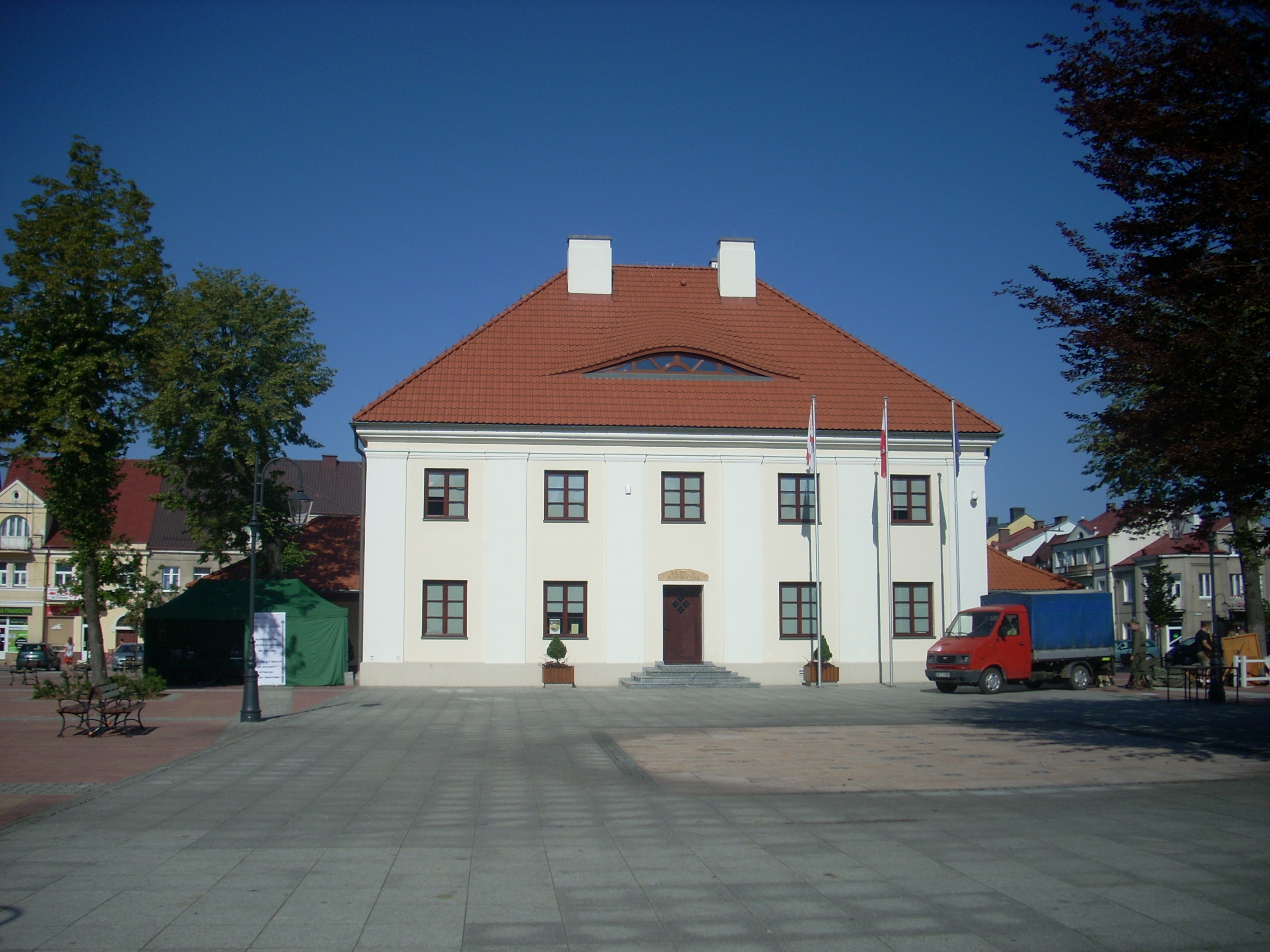 Elewacja frontowa ratusza w Przasnyszu, ob. muzeum historyczne